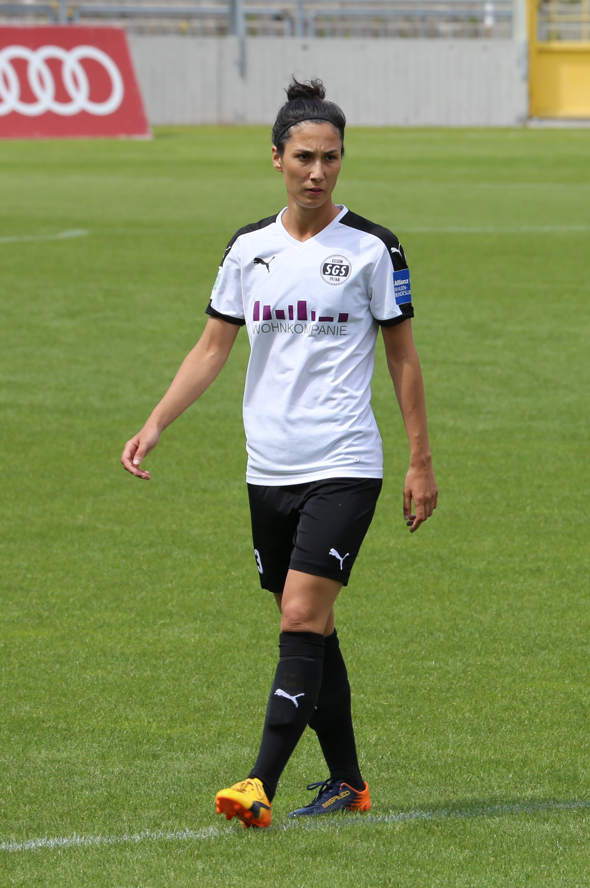 Sara Doorsoun-Khajeh (SGS Essen) beim Frauen-Bundesliga-Spiel FC Bayern München gegen SGS Essen am 21. Mai 2017 im Stadion an der Grünwalder Straße (Ergebnis war 2:0)